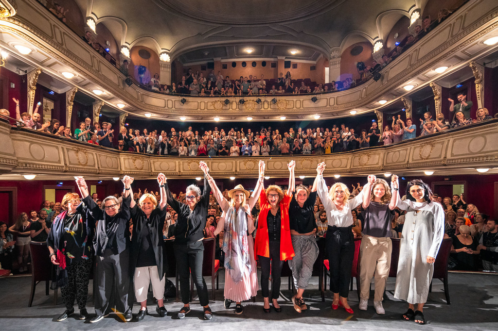 Festiwal Kino na Granicy Cieszyn 1.05.2018